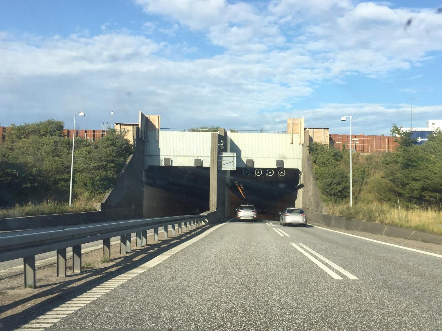 Den vestlige ende af Guldborgsundtunnellen